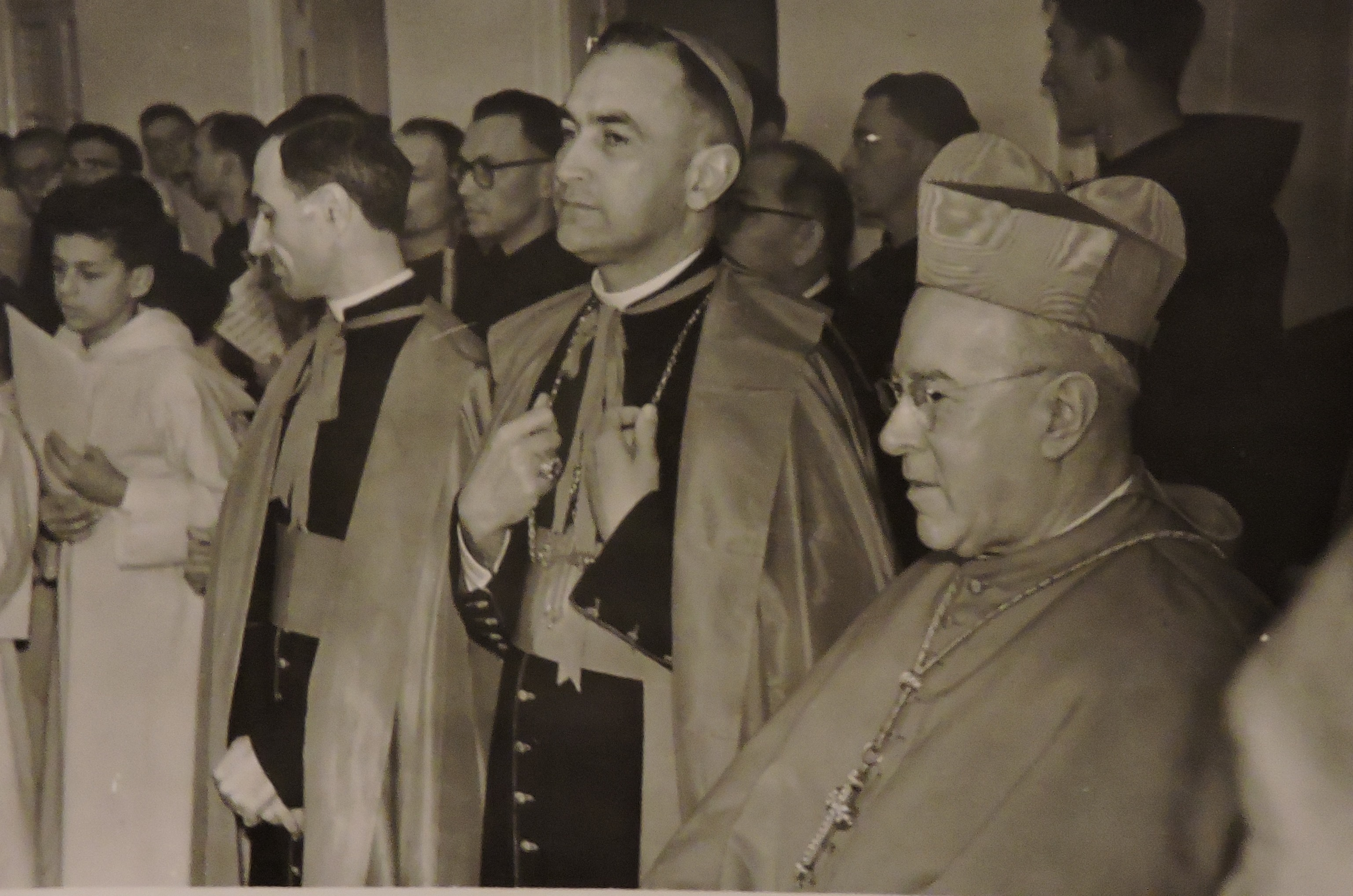 Inauguracao da primeira parte do Seminário